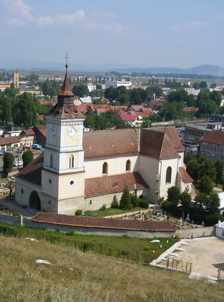 A brassói Bertalan-templom a Fortyogóhegyről nézve (Erdély)